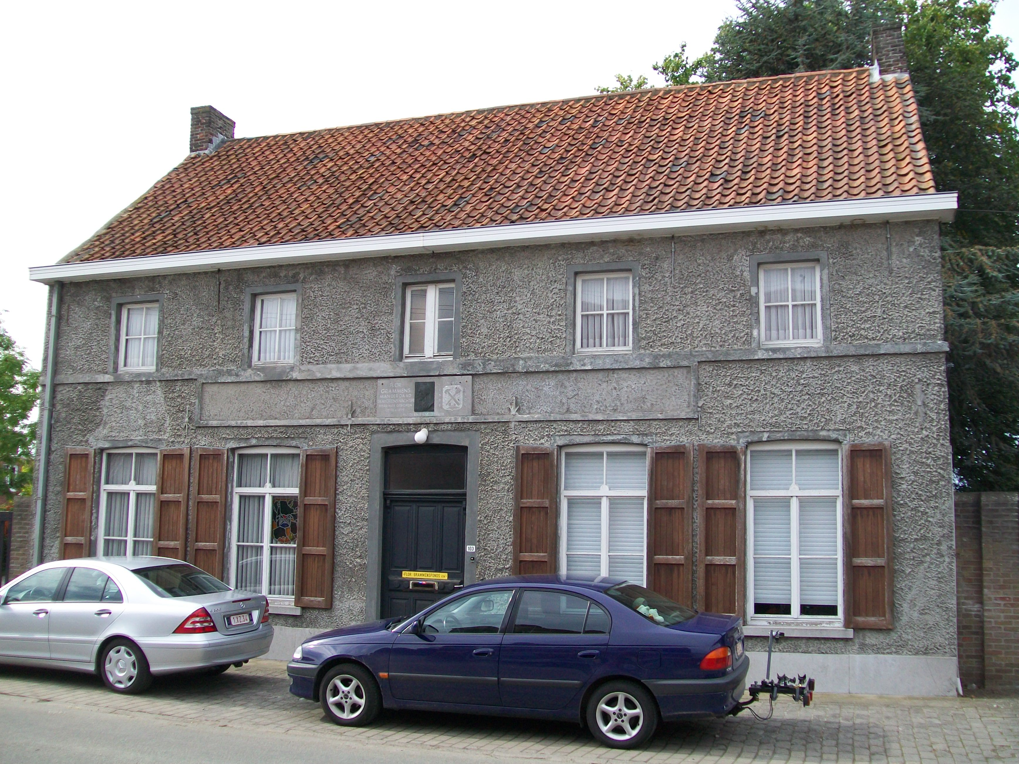 Onroerend erfgoed in Aalter: burgerhuis en geboortehuis van Flor Grammens (Bellem)